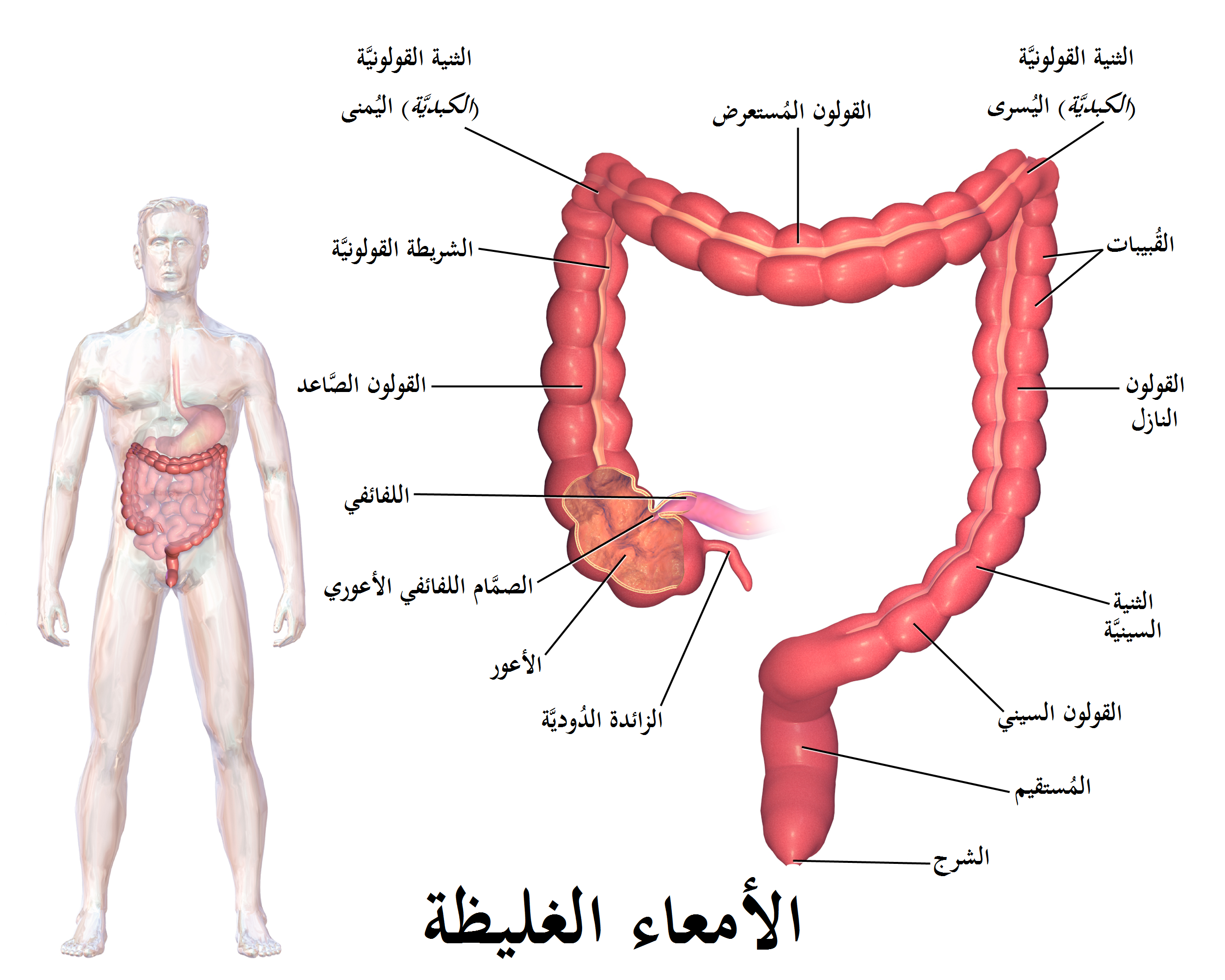 رسمٌ بيانيٌّ لِأقسام الأمعاء الغليظة.